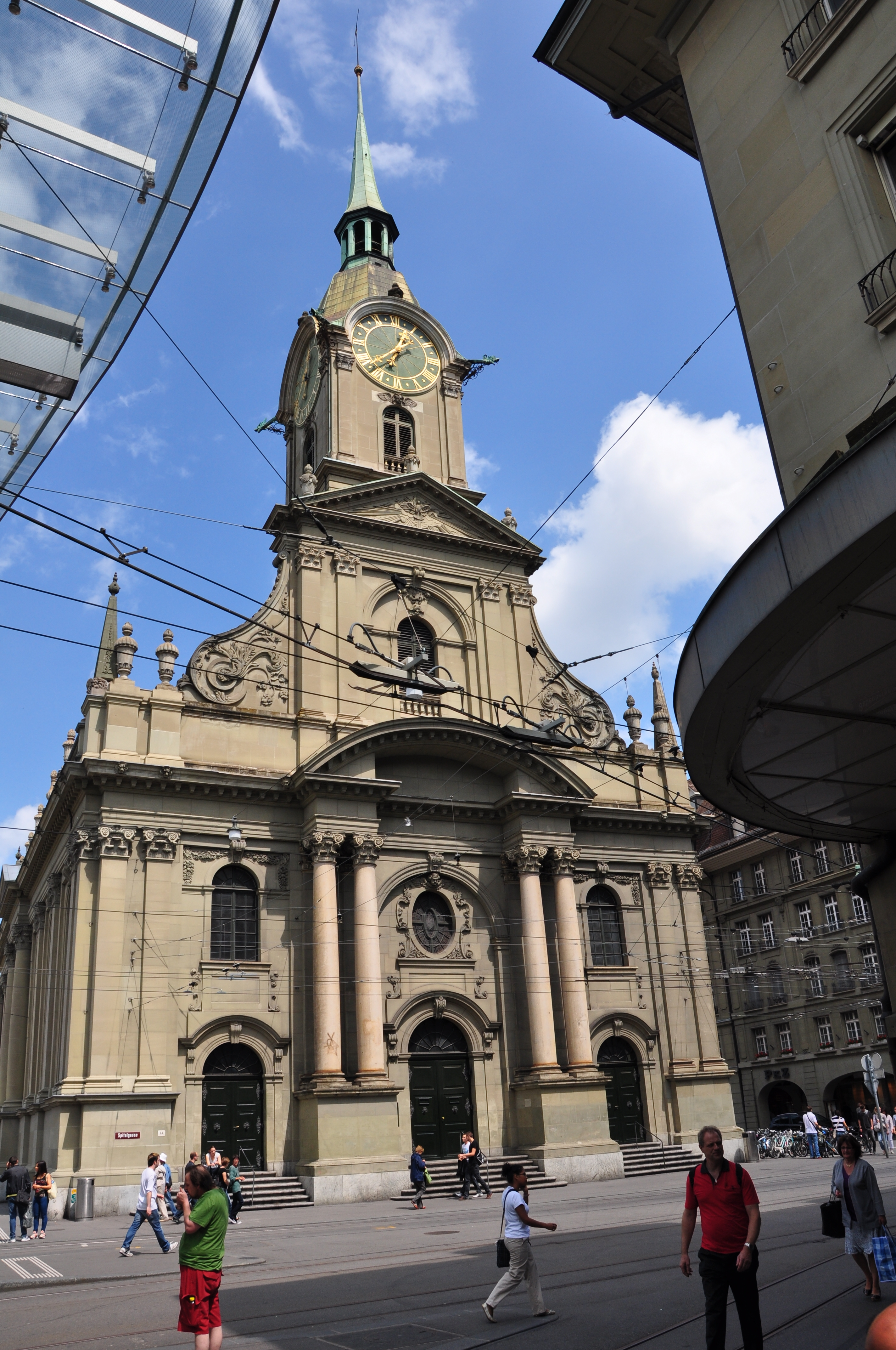 Die reforimierte Heiliggeistkirche in Bern an der Spitalgasse 44, aufgenommen vom Baldachin aus.